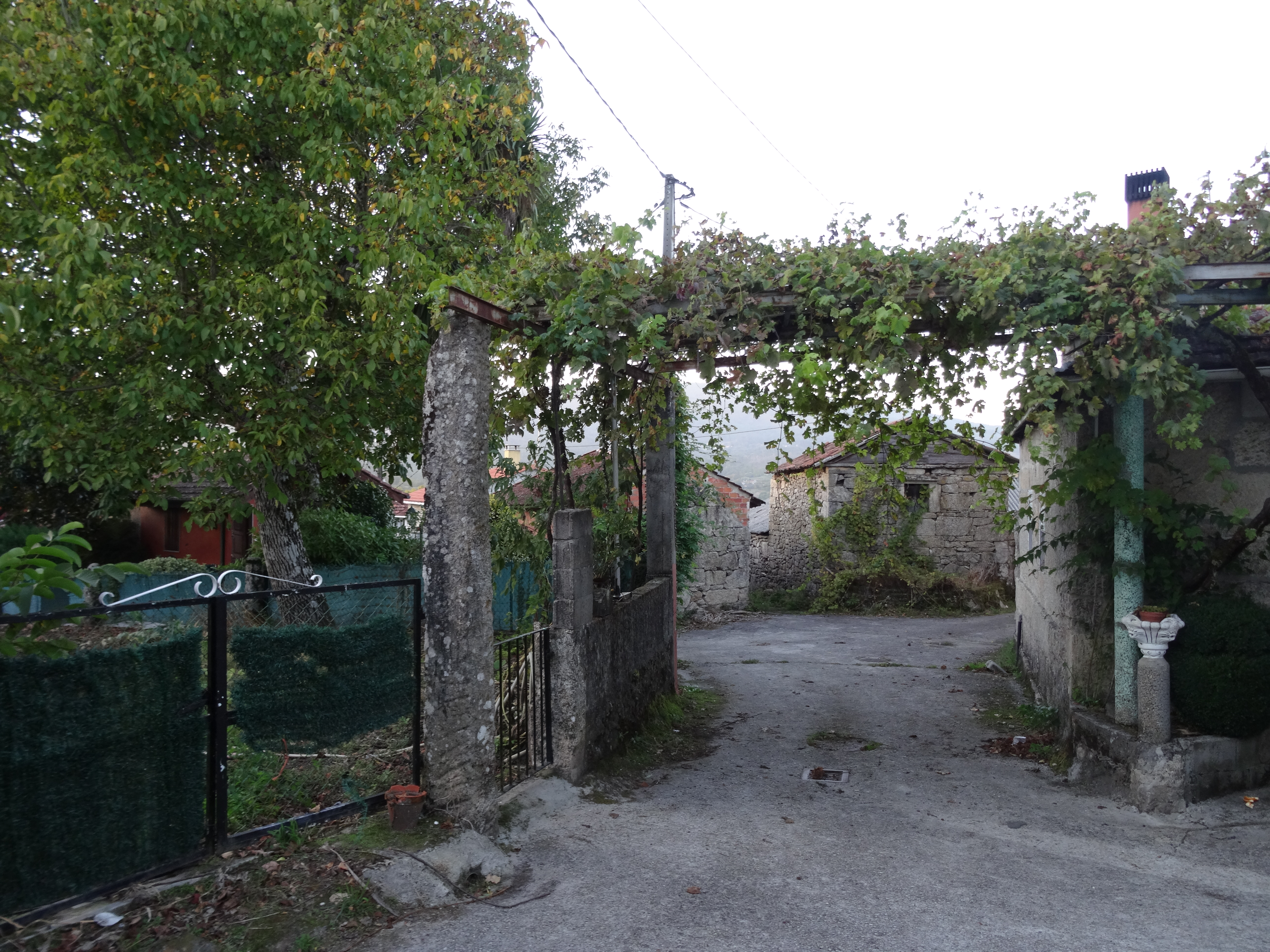 Ver título.